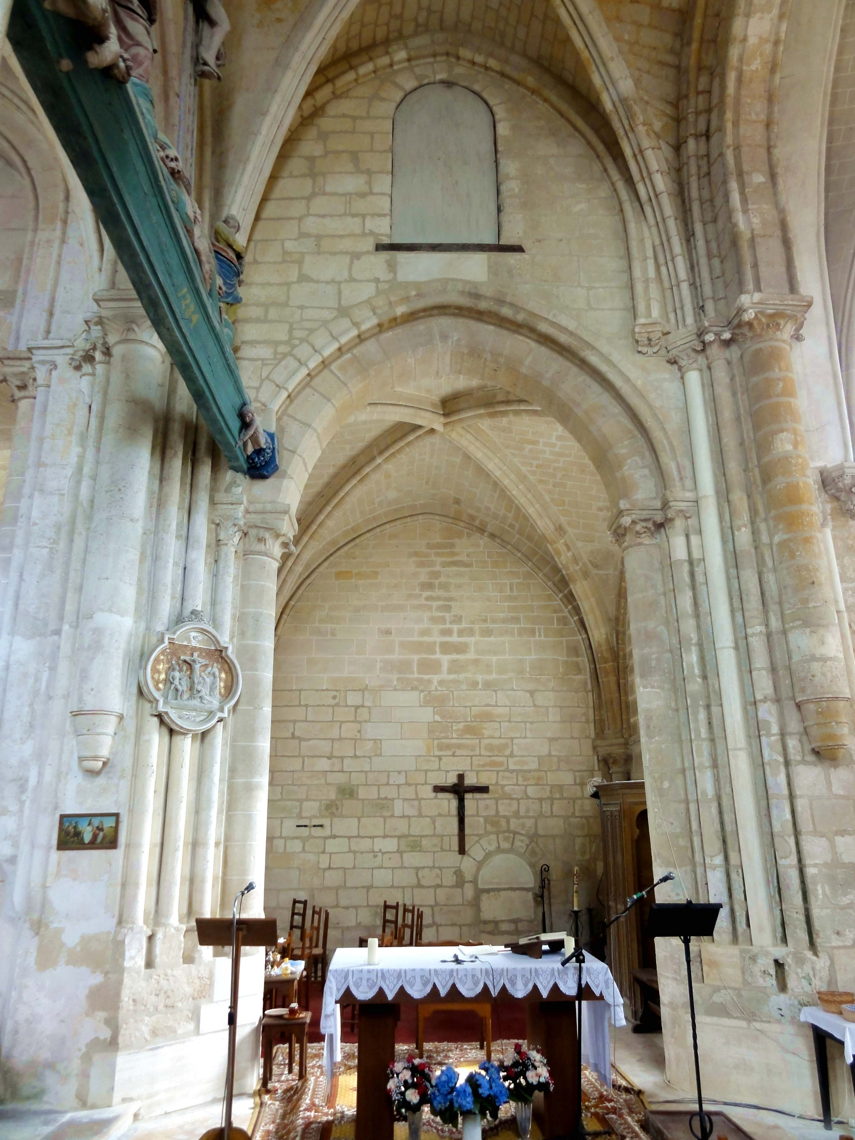 Intérieur de l'église - voir titre.